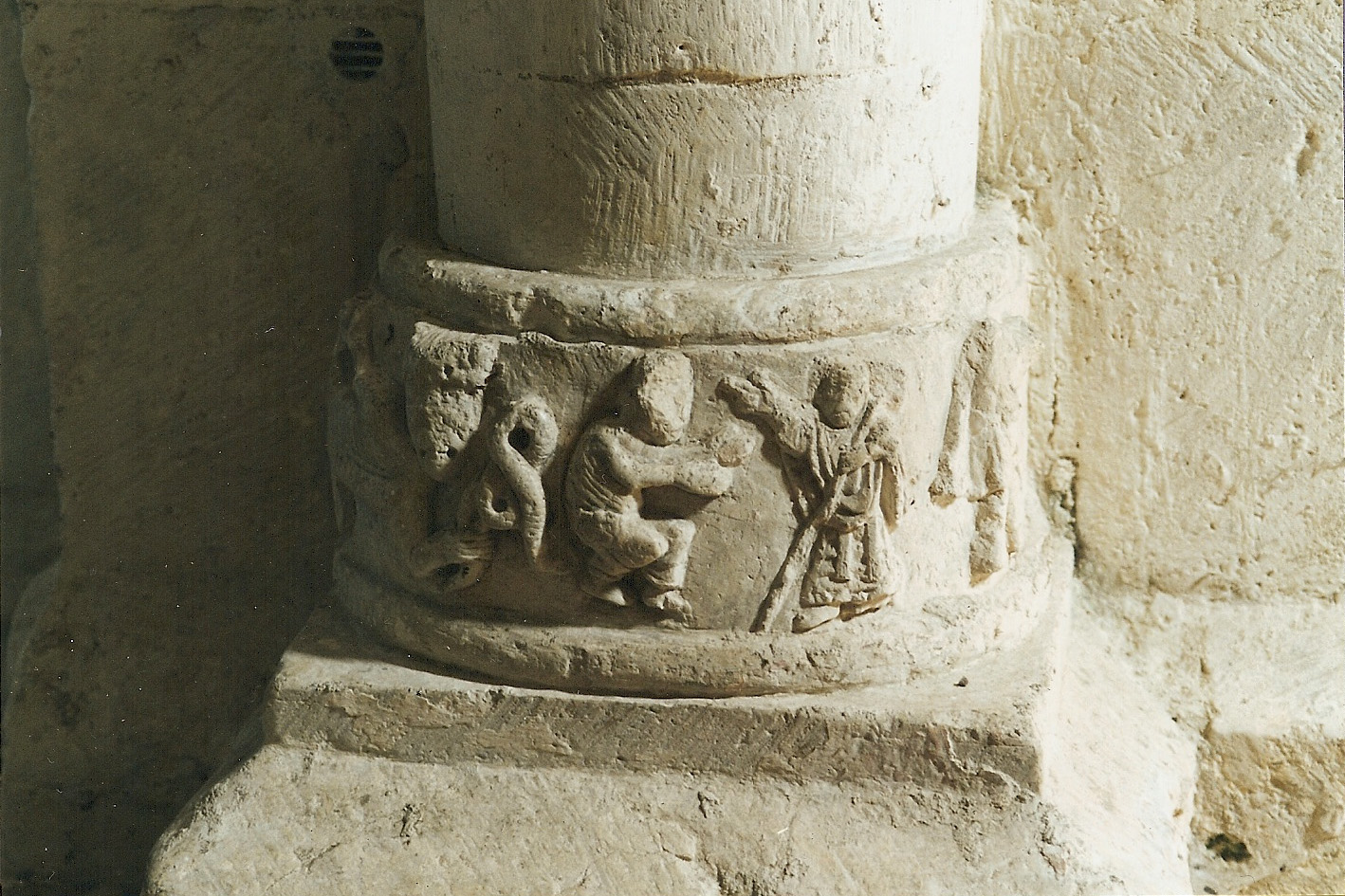 St.-André-de-Bâgé, Dienstbasis in Vierun